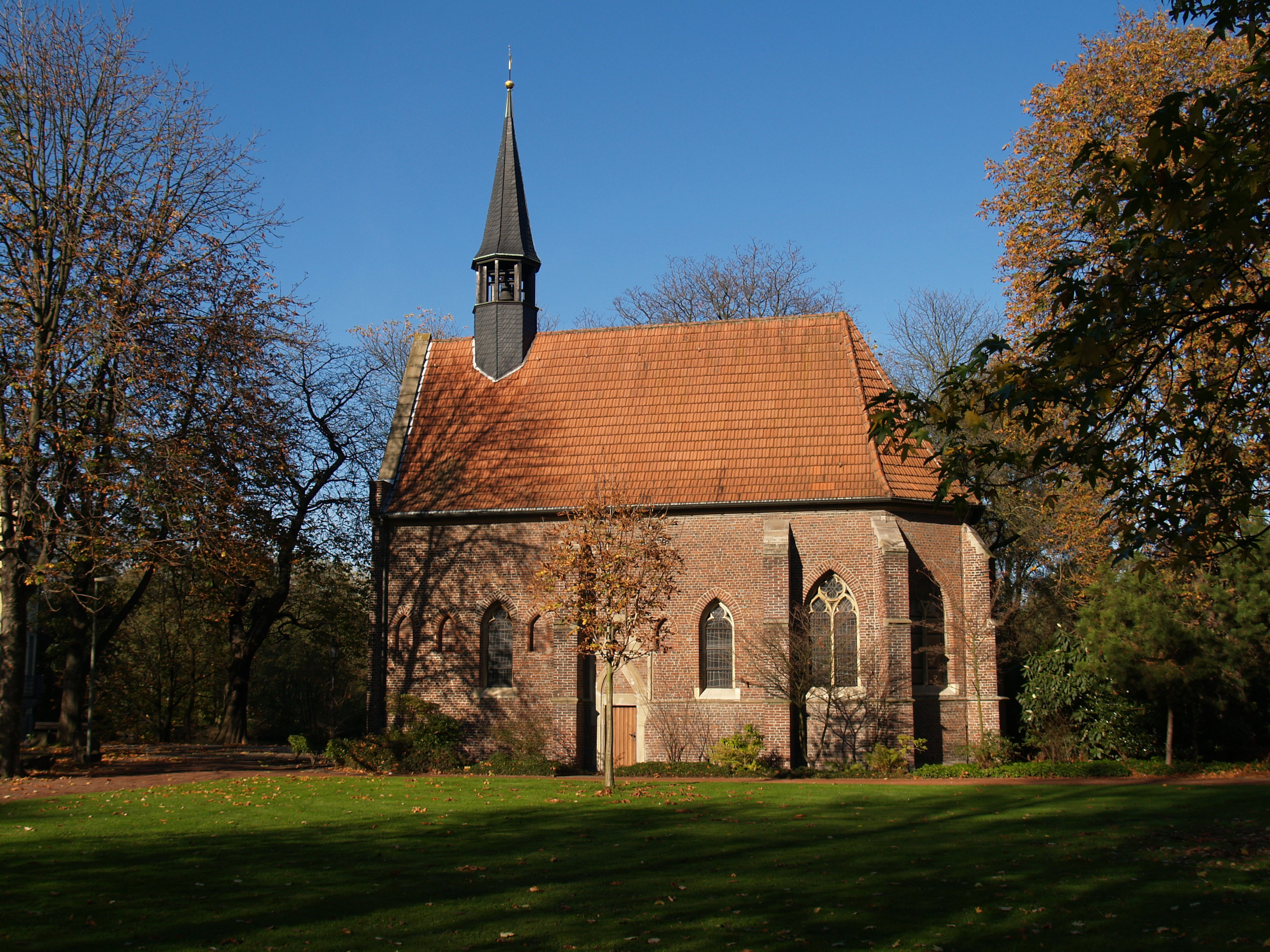 Schloss Strünkede, Herne, Schlosskapelle, das älteste erhaltene Gebäude in Herne